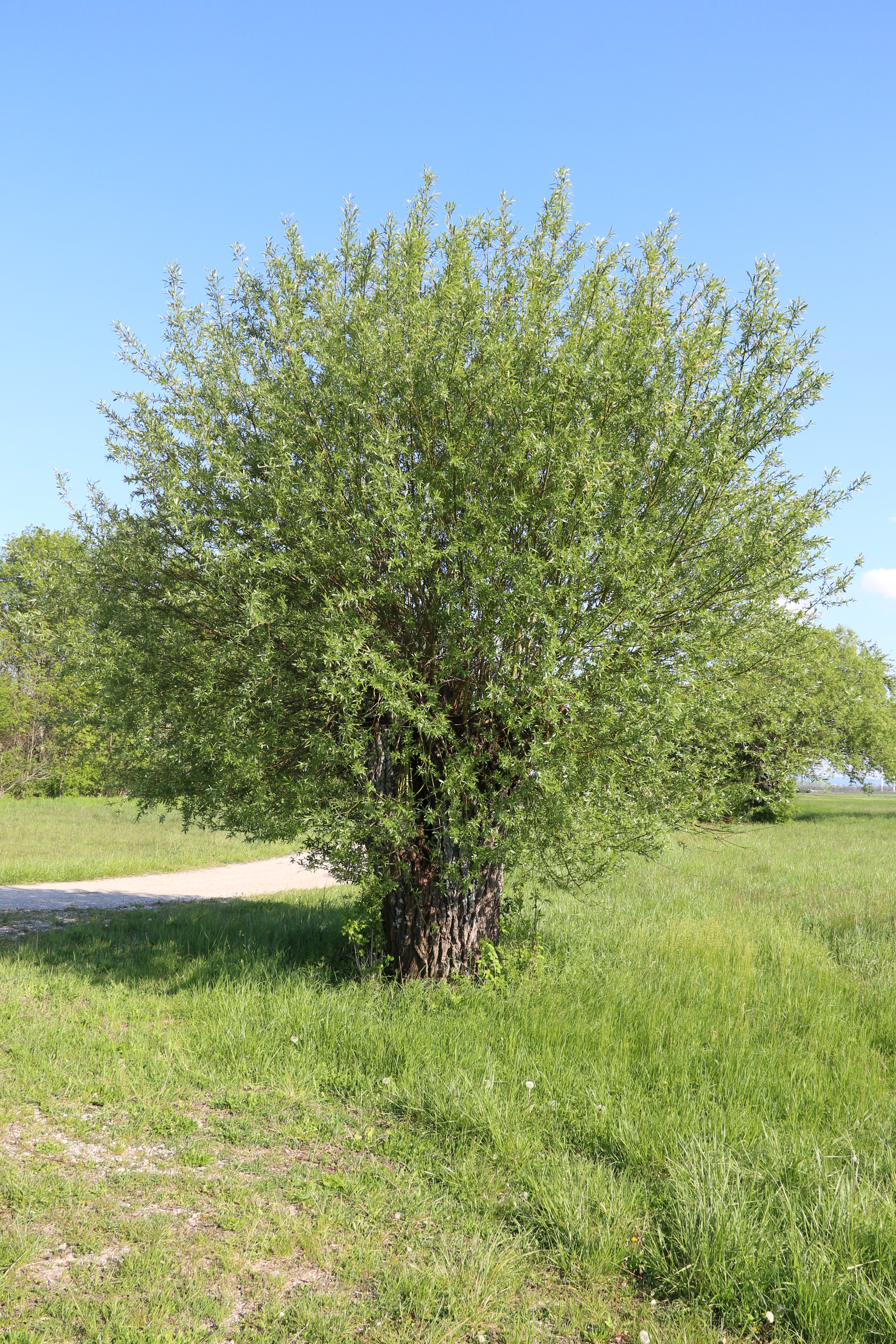 Feuchtgebiet Oberwaltersdorf-Tattendorf This media shows the natural monument in Lower Austria with the ID BN-134.